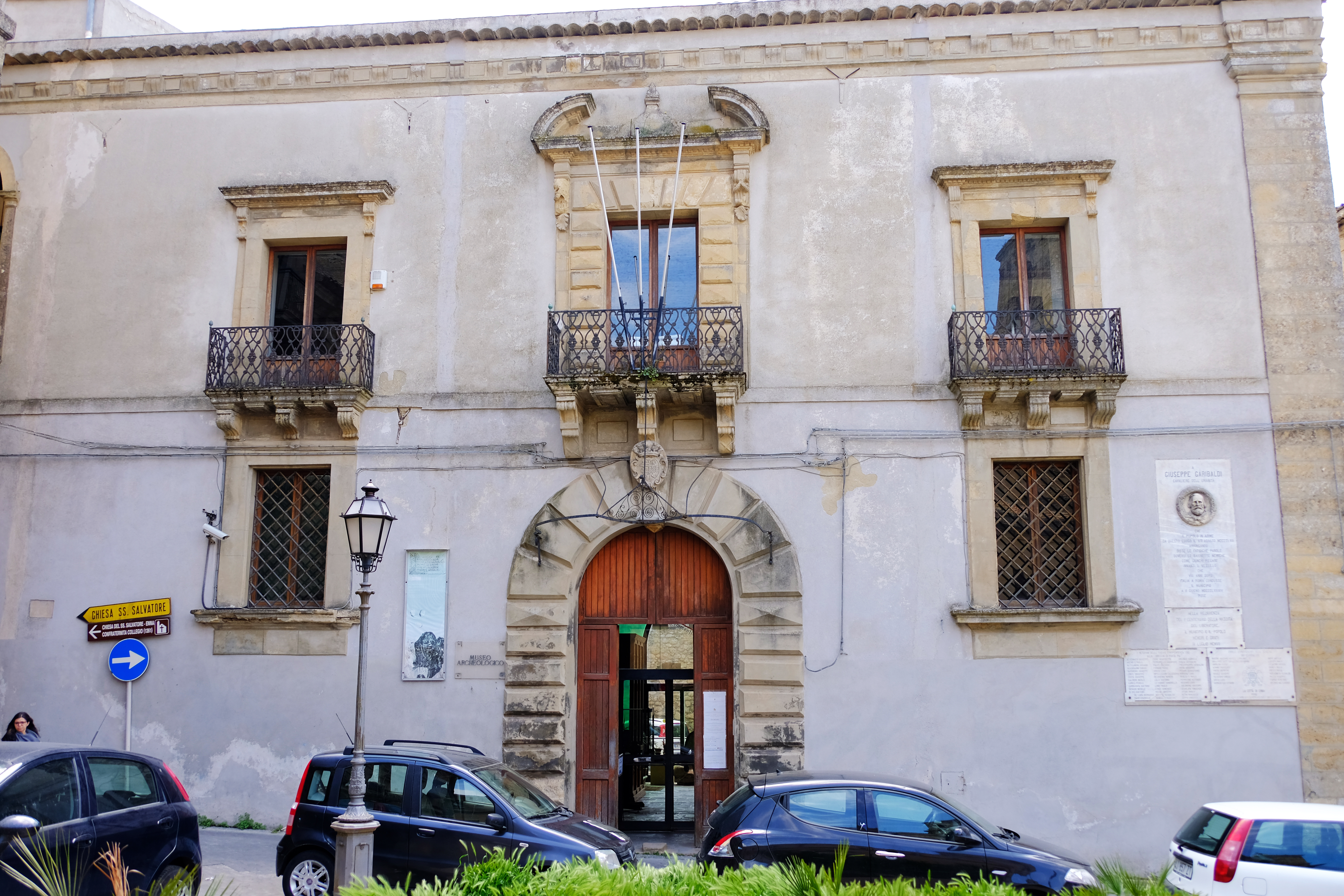 Museo archeologico regionale di Enna